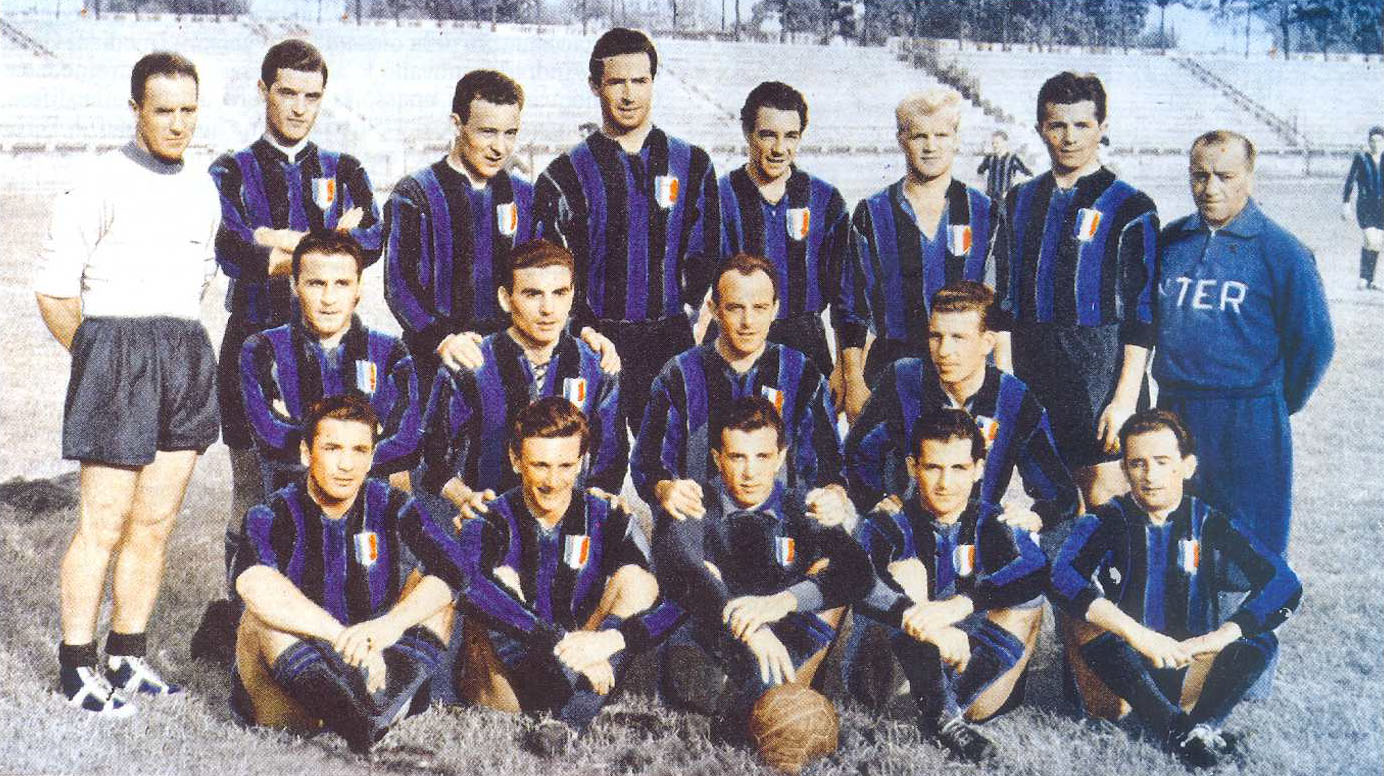 La rosa e lo staff tecnico dell'Inter nella stagione 1952-53, in posa con le maglie scudettate al termine del vittorioso campionato italiano di Serie A 1952-53. Da sinistra, in alto: A. Foni (allenatore), G. Armano, P. Broccini, B. Mazza, B. Lorenzi, L. Skoglund, I. Nyers, Della Casa (massaggiatore); al centro: M. Neri, O. Fattori, A. Giovannini, F. Nesti; in basso: I. Blason, L. Grava, G. Ghezzi, G. Giacomazzi, B. Padulazzi.